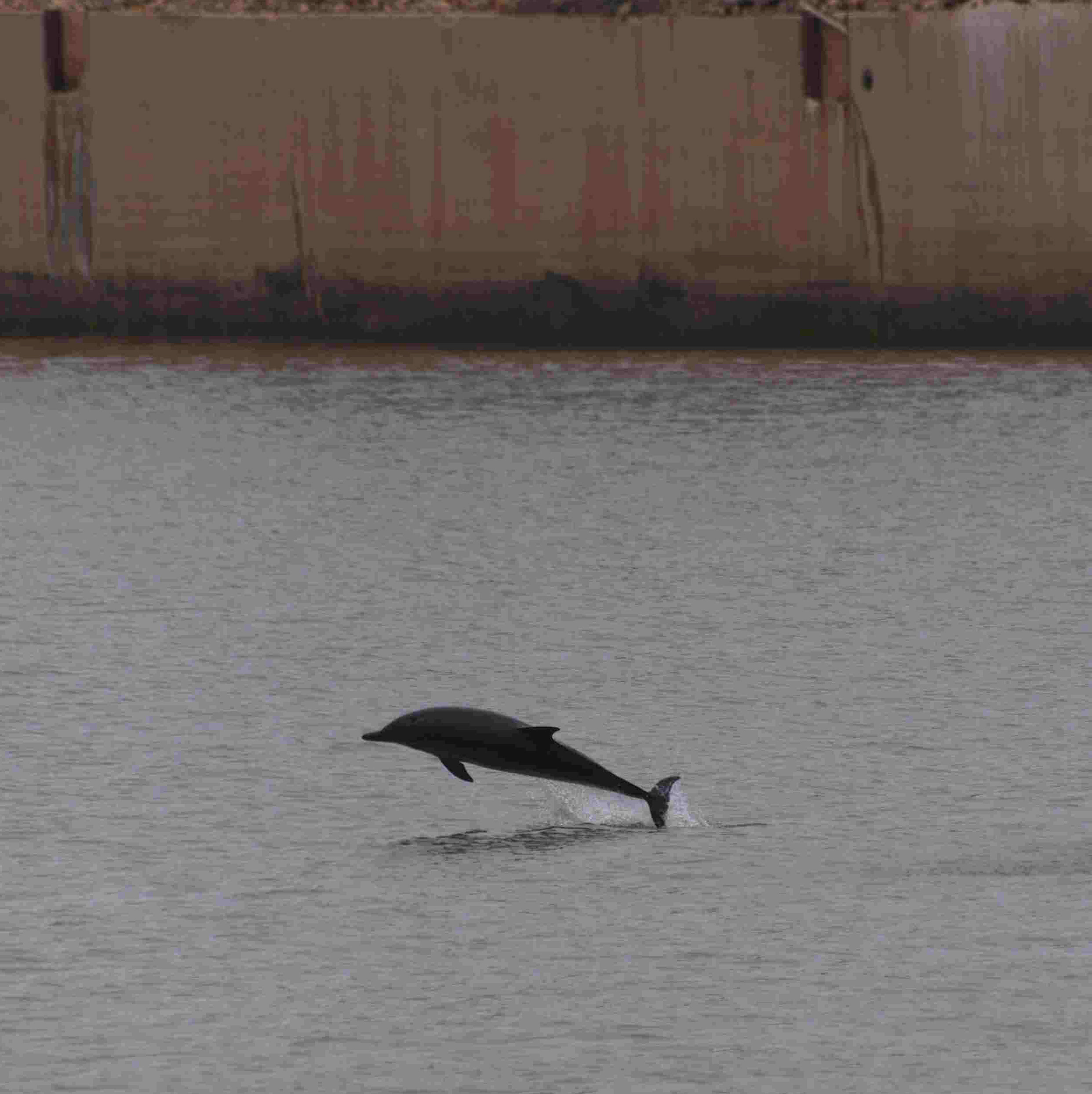 Delfines en el puerto de Gijón o El Musel, en el Principado de Asturias